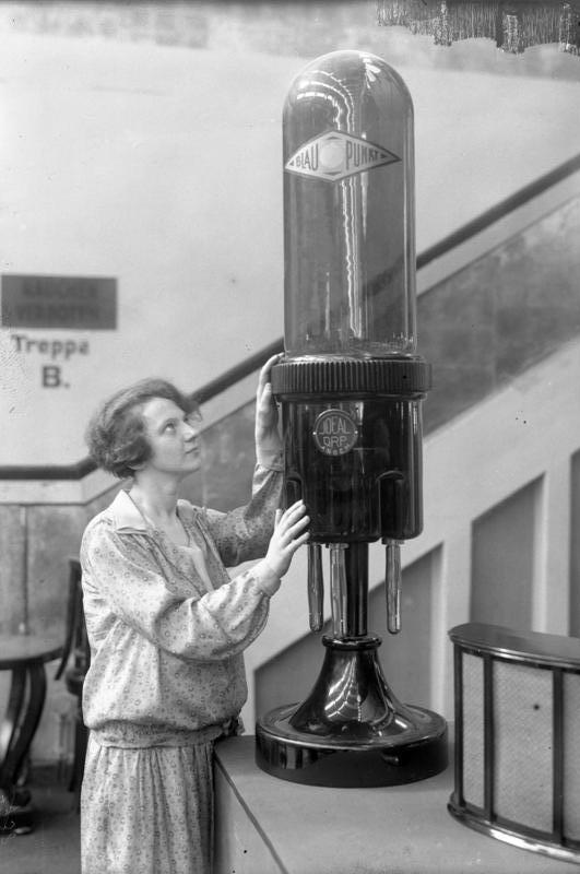 Die Eröffnung der großen Funkausstellung in Berlin! Eine überdimensionale Radio-Verstärker-Röhre auf der Funkausstellung in Berlin.